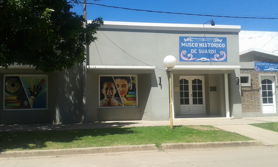 Museo ubicado en la ciudad de Suardi (Santa Fe)